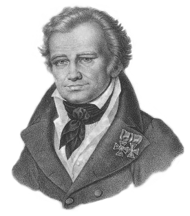 General Stanisław Mokronowski